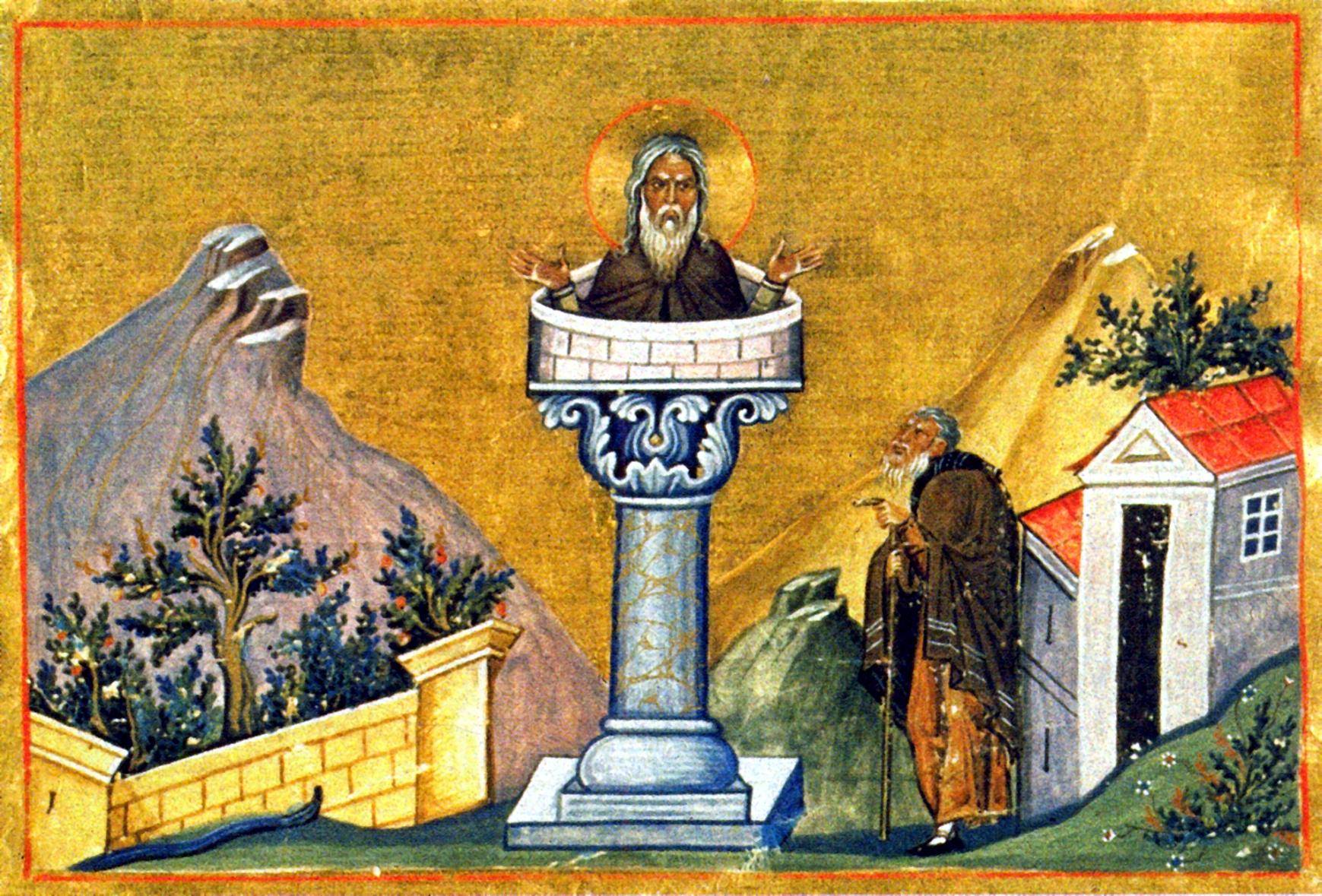 Daniel Stylites. Menologion of Basil II // Ο άγιος Δανιήλ ο Στυλίτης. Μικρογραφία από το Μηνολόγιο του αυτοκράτορα Βασιλείου Β΄ (φ. 237).